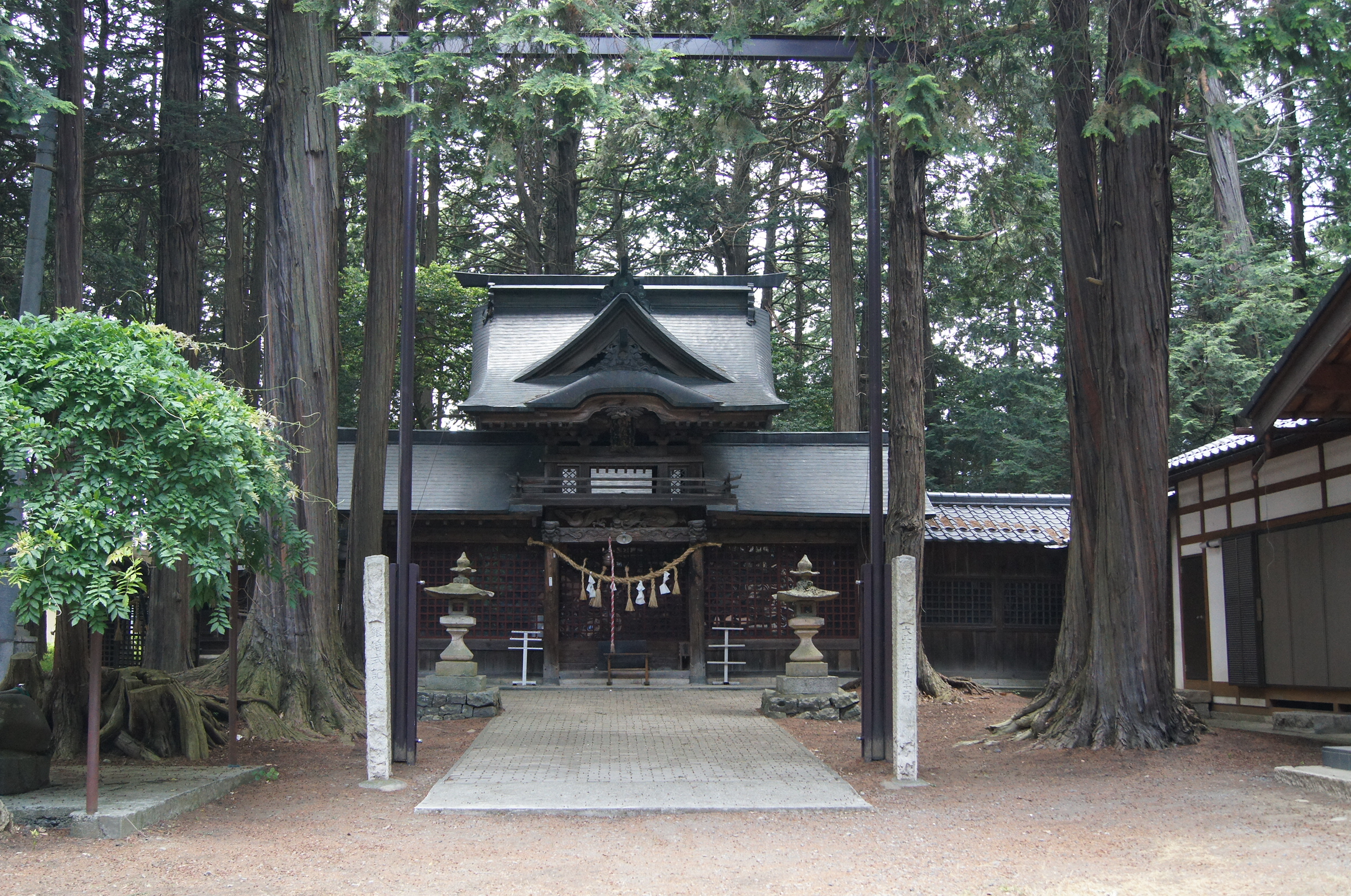 長野県松本市波田森口にある三神社の社殿